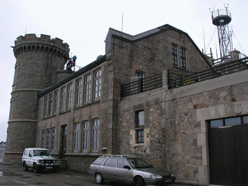 Station météorologique du Mont Aigual France 2004. Cevenol2